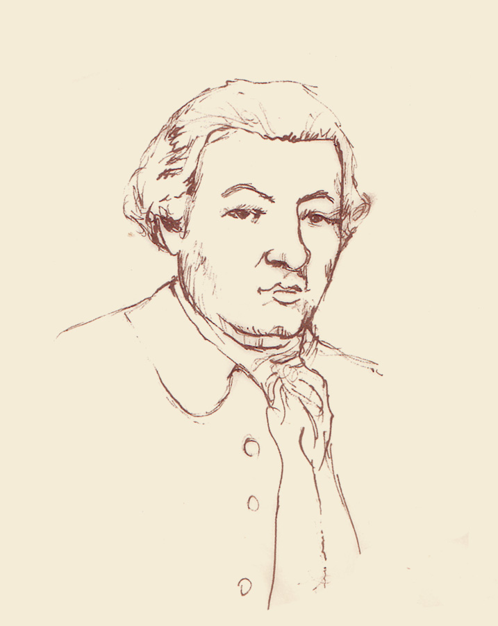 Portrait de Charles Théveneau de Morande, d'après une gravure reproduite en frontispice de l'ouvrage de Paul Robiquet, Théveneau de Morande. Étude sur le XVIIIe, siècle, Quantin, 1882.